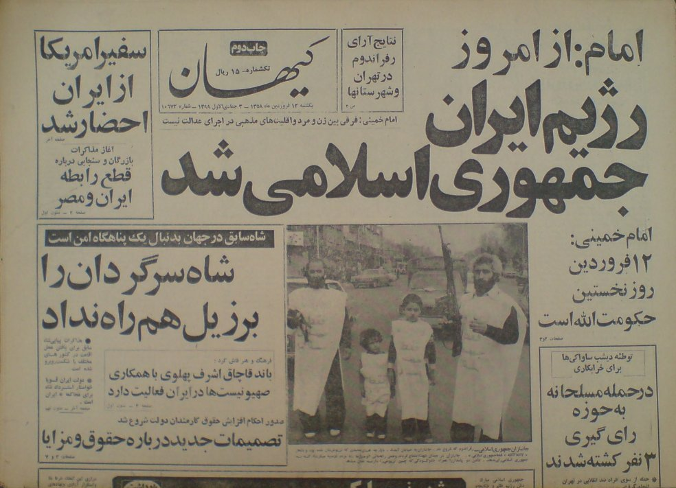 صفحهٔ نخست روزنامهٔ کیهان ۱۳ فروردین ۱۳۵۸